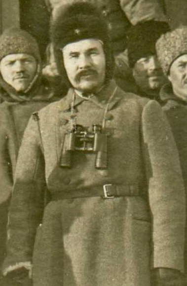 Кожевников Інокентій Серафимович(1879–1931) — активний учасник Громадянської війни, один з організаторів партизанської боротьби в тилу білих. Член Комуністичної партії з 1917. У Червоній Армії з 1918